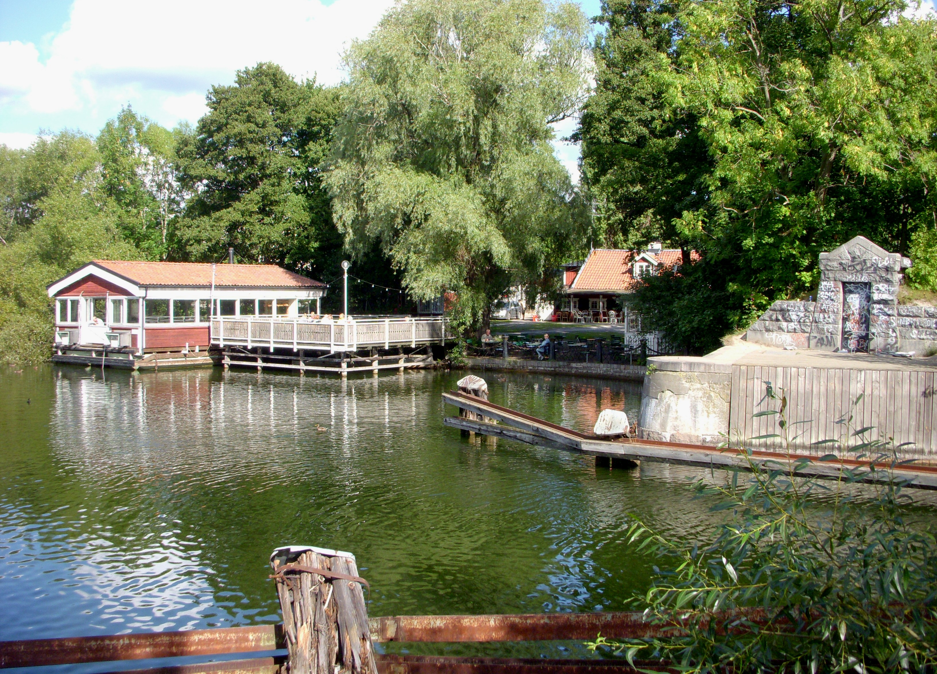 Fittja näs och Fittjaviken, Huddinge (även kallad Hagaudd)